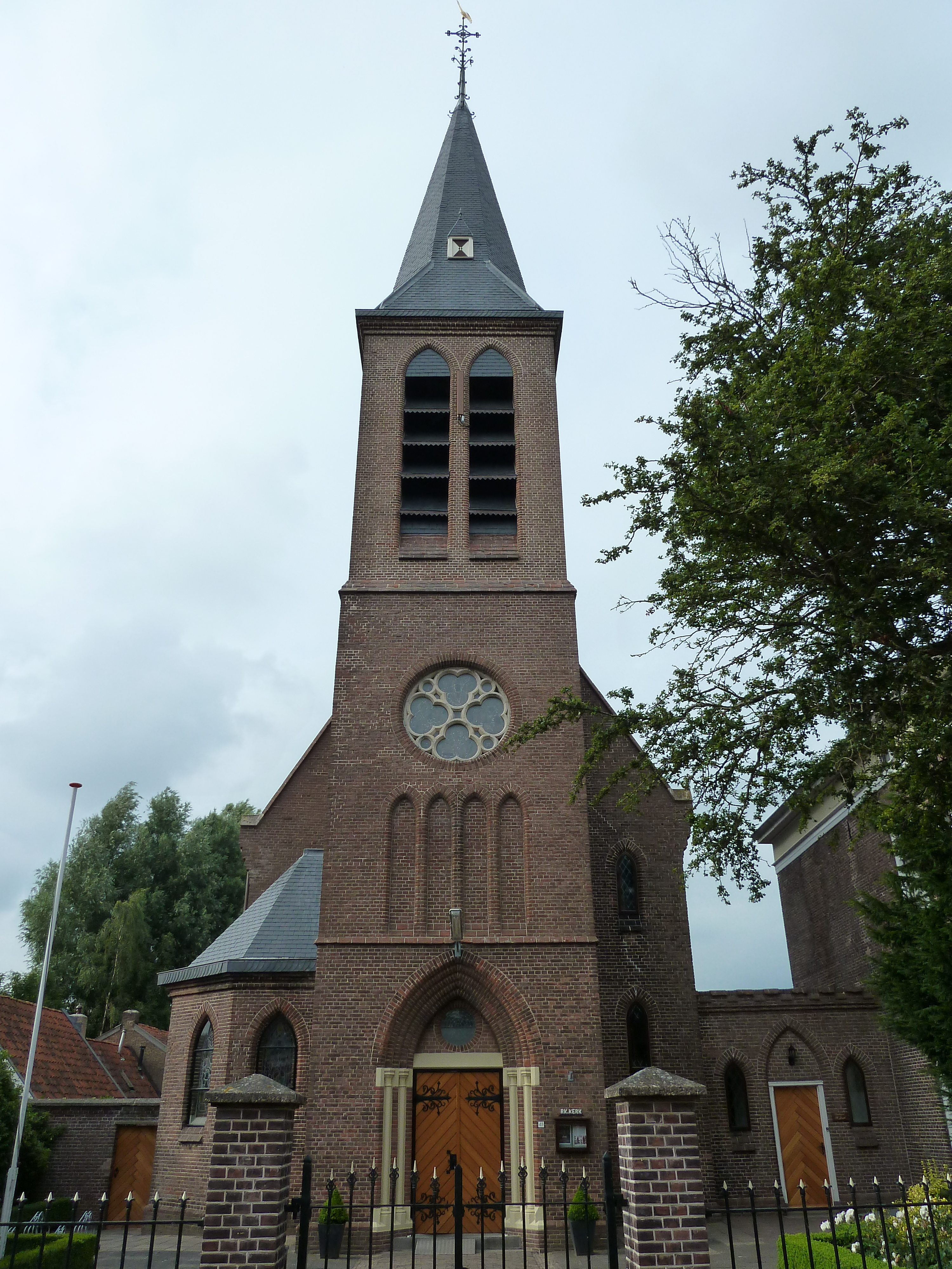 Heech: Sint-Jozeftsjerke